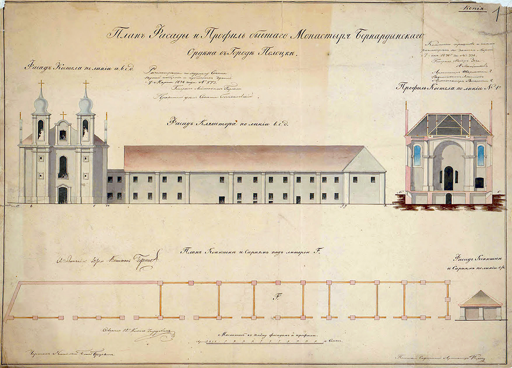 Беларуская (тарашкевіца): Полацак (Połacak), Задзьвіньне (Zadźvińnie). Касьцёл Сьвятой Ганны і кляштар бэрнардынаў, абмеры